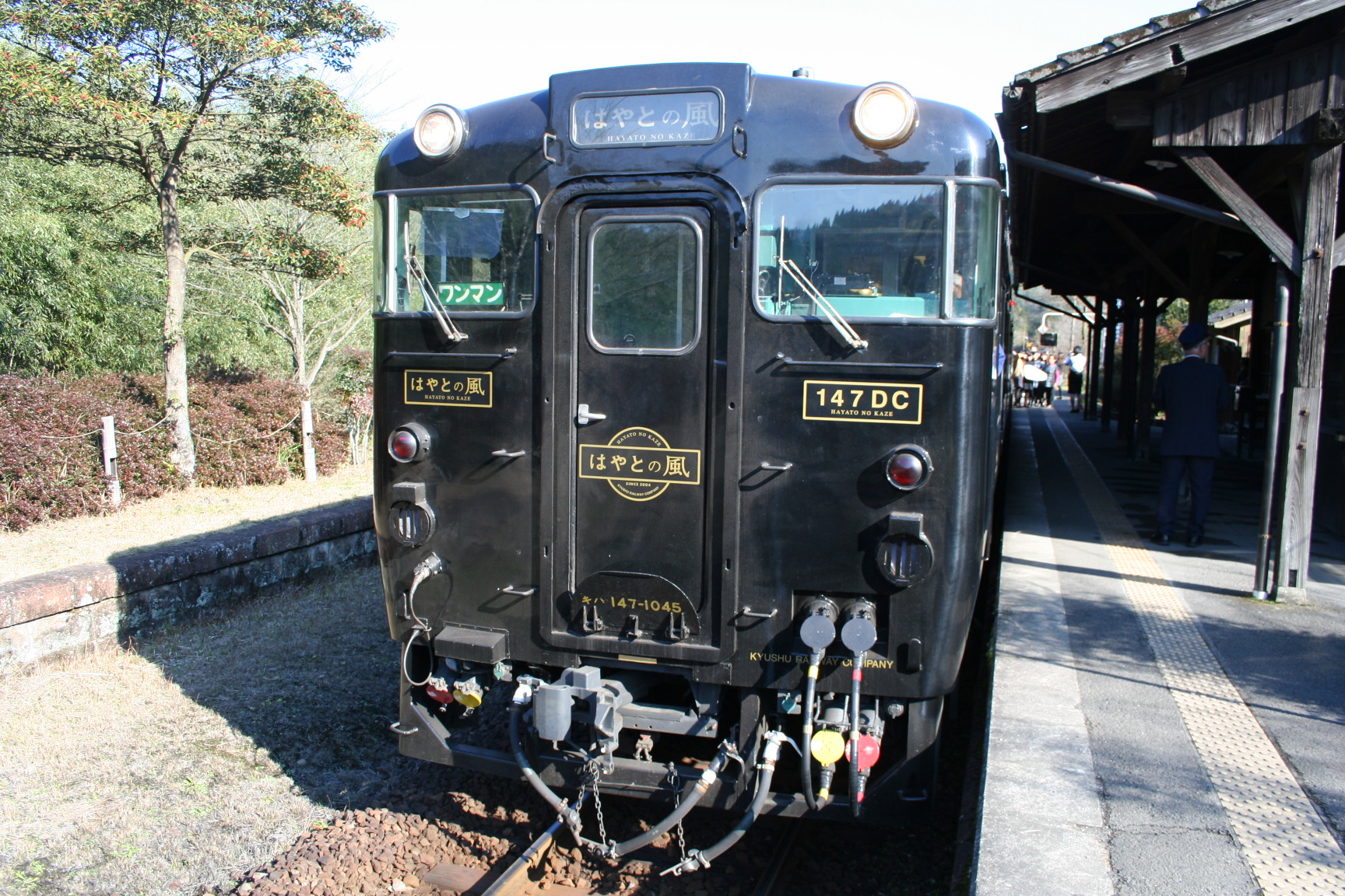 キハ147-1045 はやとの風